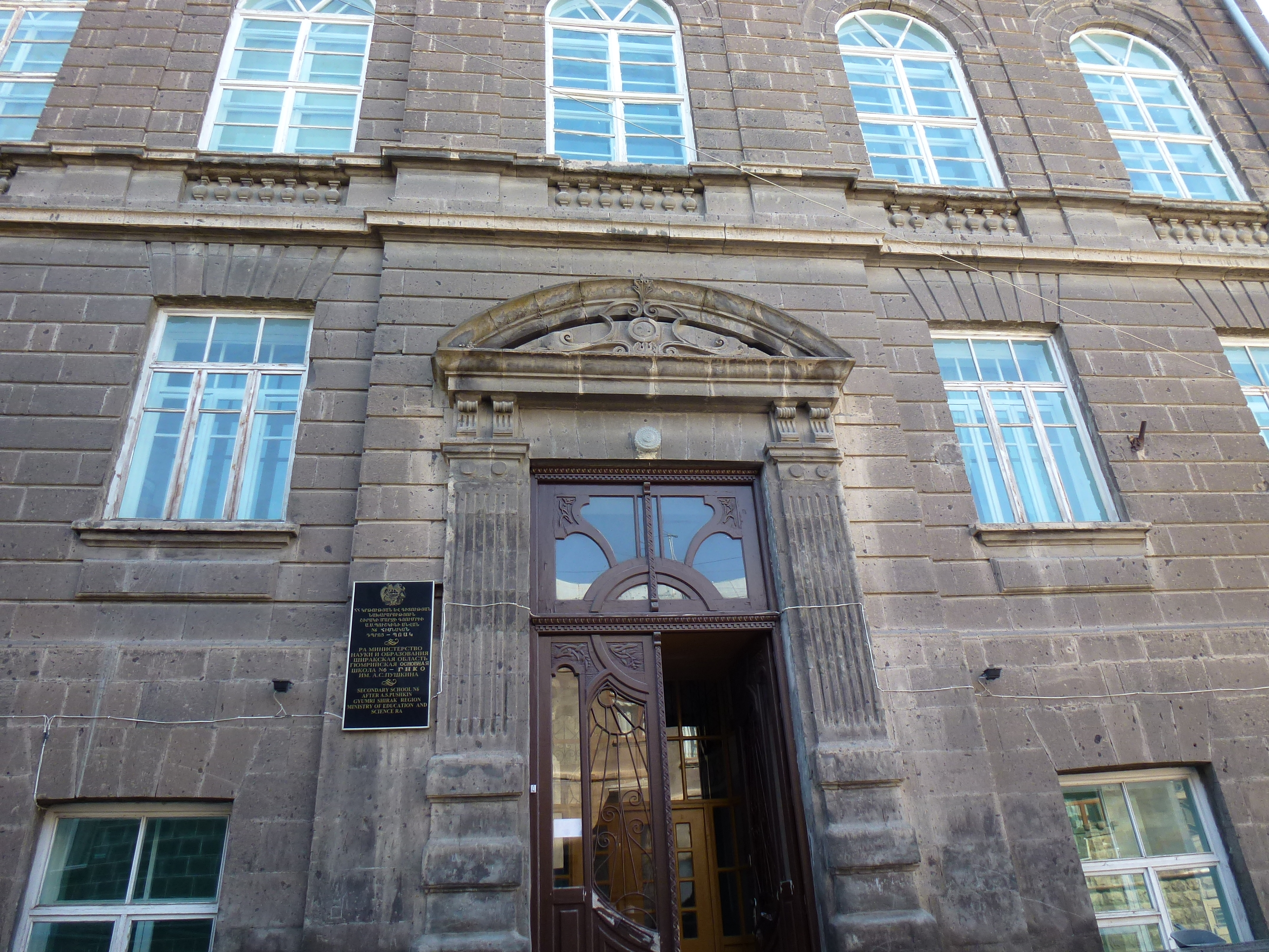 Գյումրու Օրիորդաց գիմնազիան 1/4.919